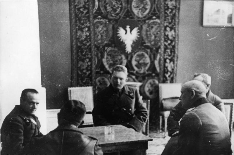 Deutsche und russische Truppen trafen sich. Fühlungnahme an mehreren Stellen. Mit den auf die festgelegten Demarkationslinien vorrückenden sowjetrussischen Truppen wurde an mehreren Stellen die Fühlung aufgenommen. 23.9.39. PK Ho E 4947 a.b. WB Fremke-Hinz-PK.-Weltbild "FR.OKW."